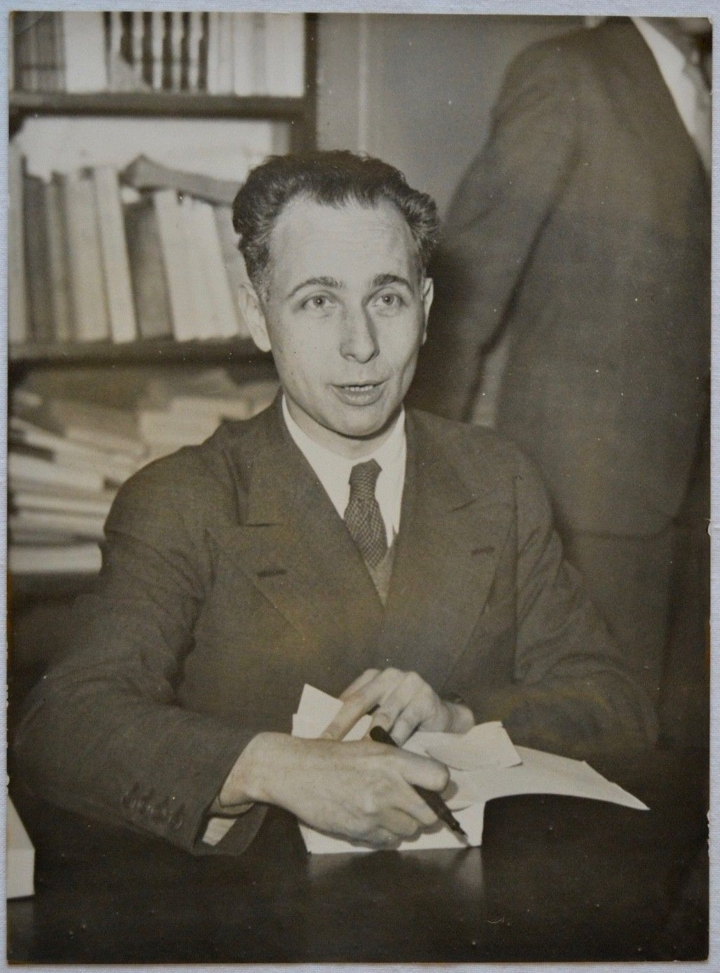 Louis Aragon. Photographie prise pour l'attribution du prix Renaudot au roman Les Beaux Quartiers le 9 décembre 1936.